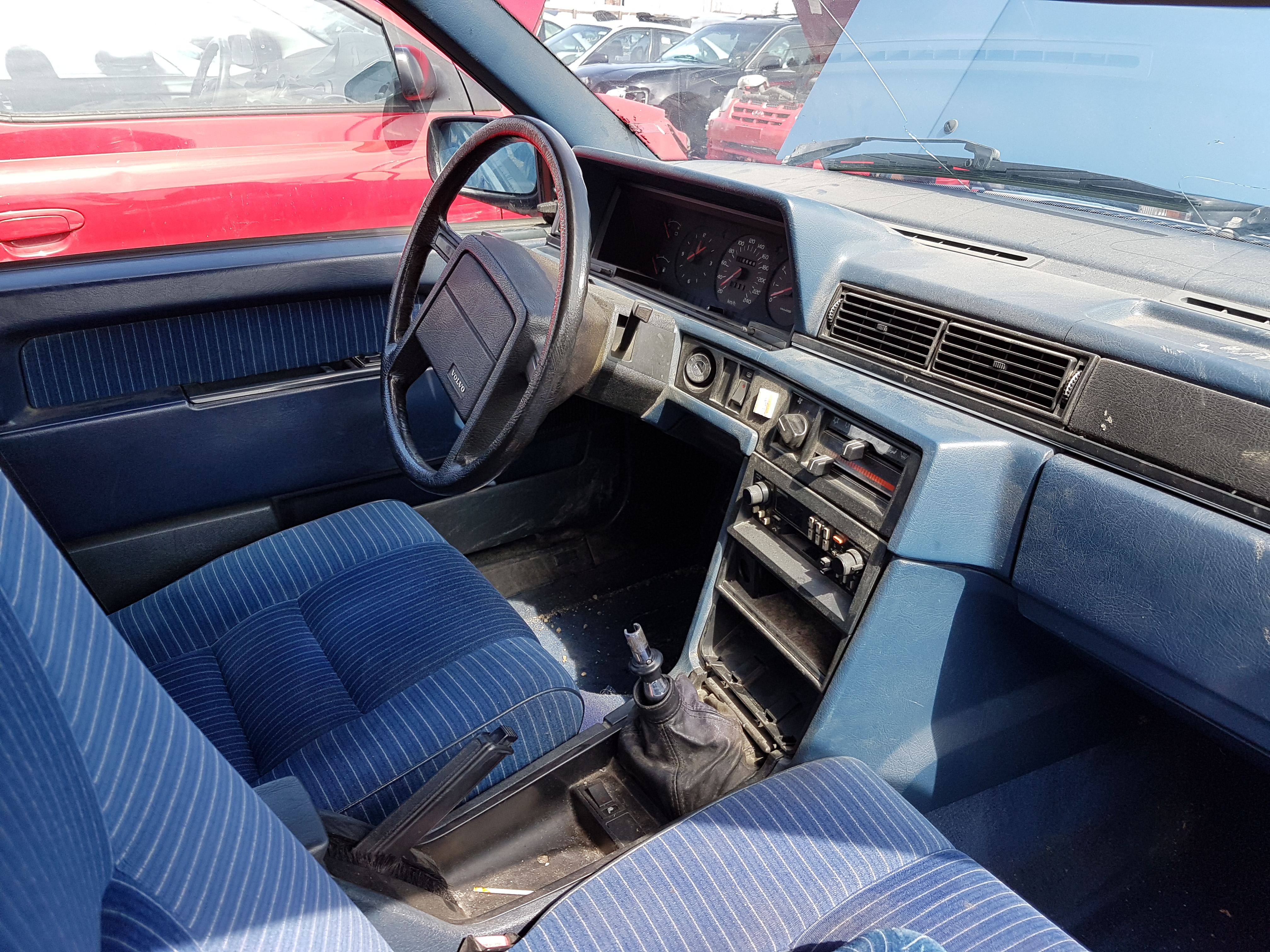 1985 Volvo 740 Turbo - interior